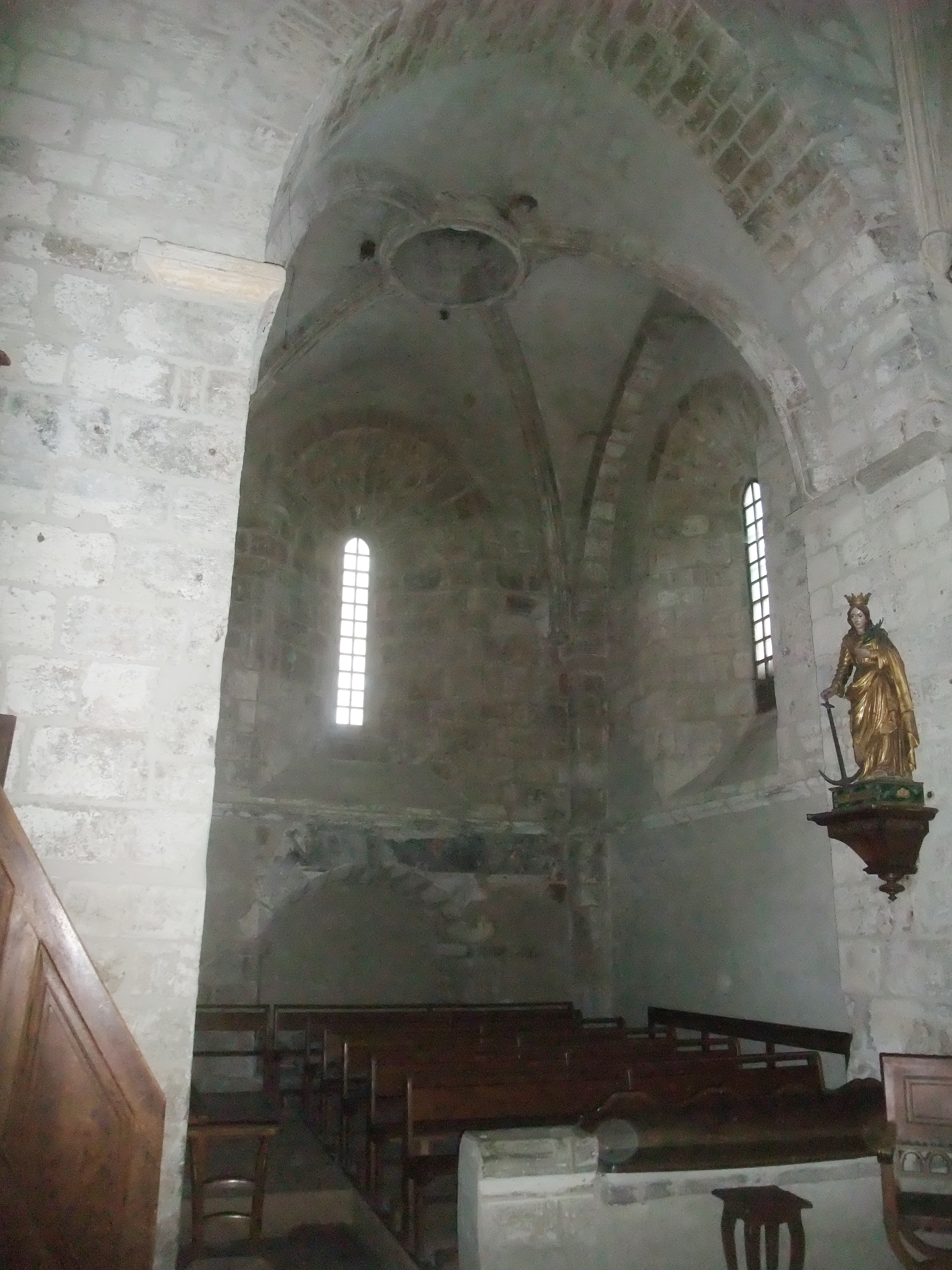 Quintenas église abside